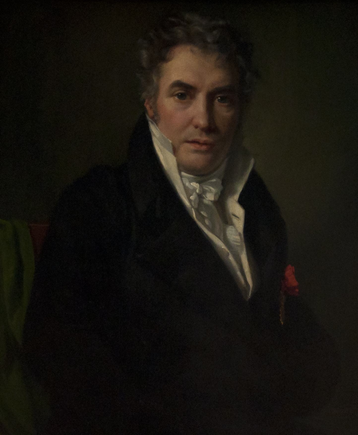 Portrait de Jacques-Louis David